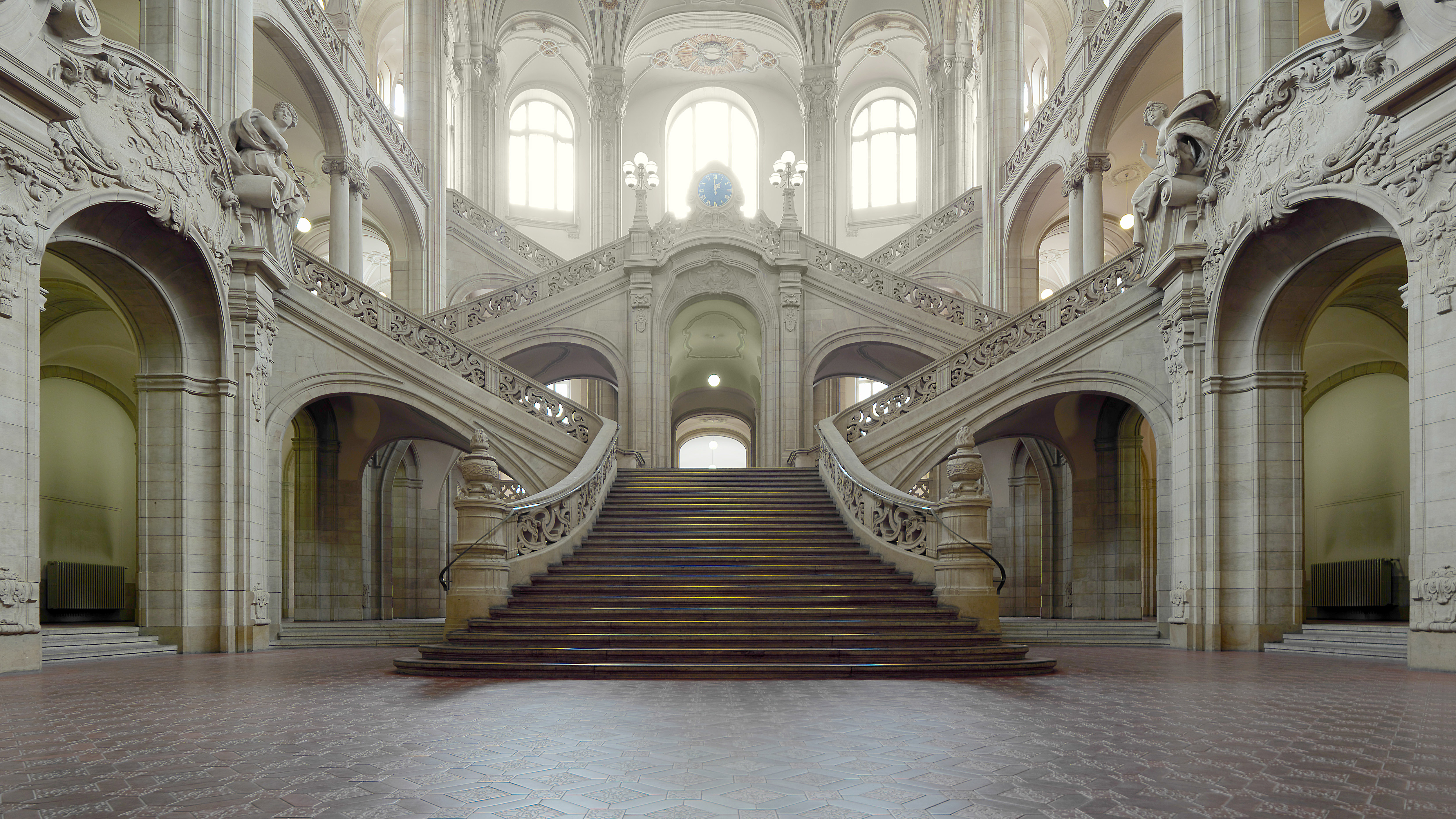 Foyer mit Treppen des Kriminalgerichts in Berlin-Moabit